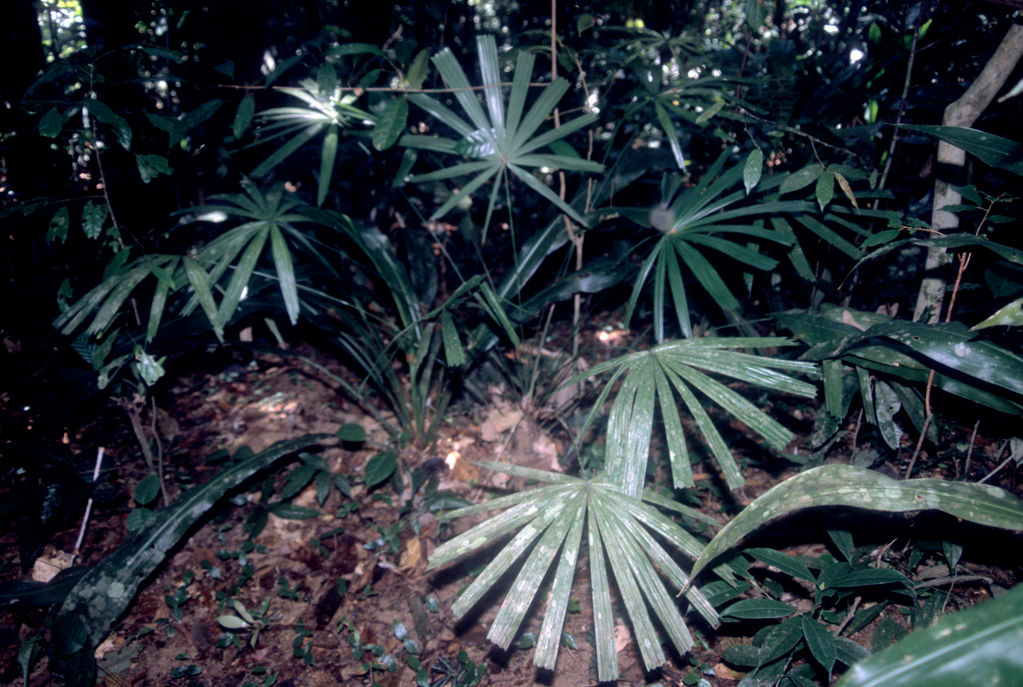 Sungai Nipah, Terengganu, Malaysia. Oct 2002. from slide.